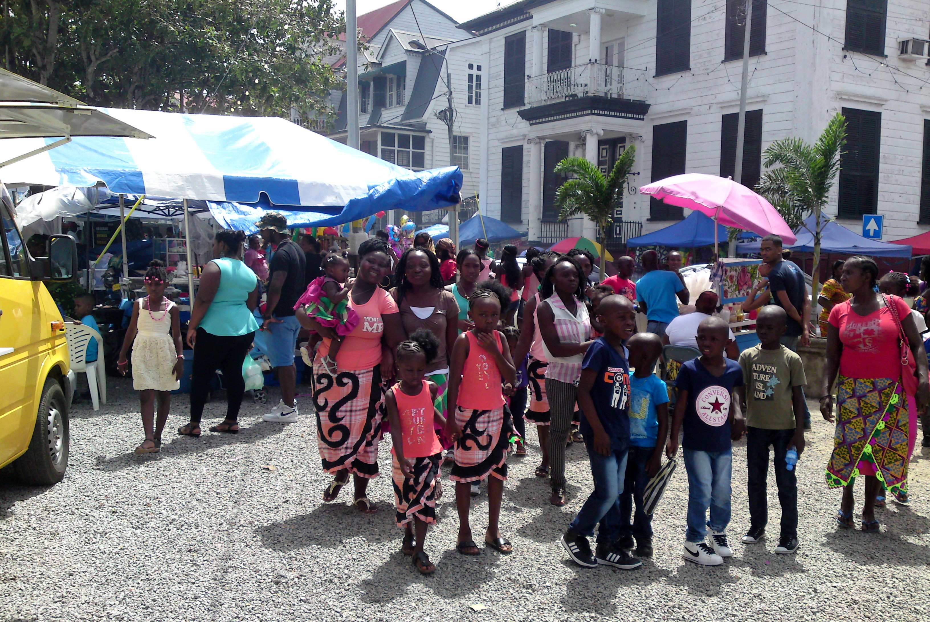 Keti Koti